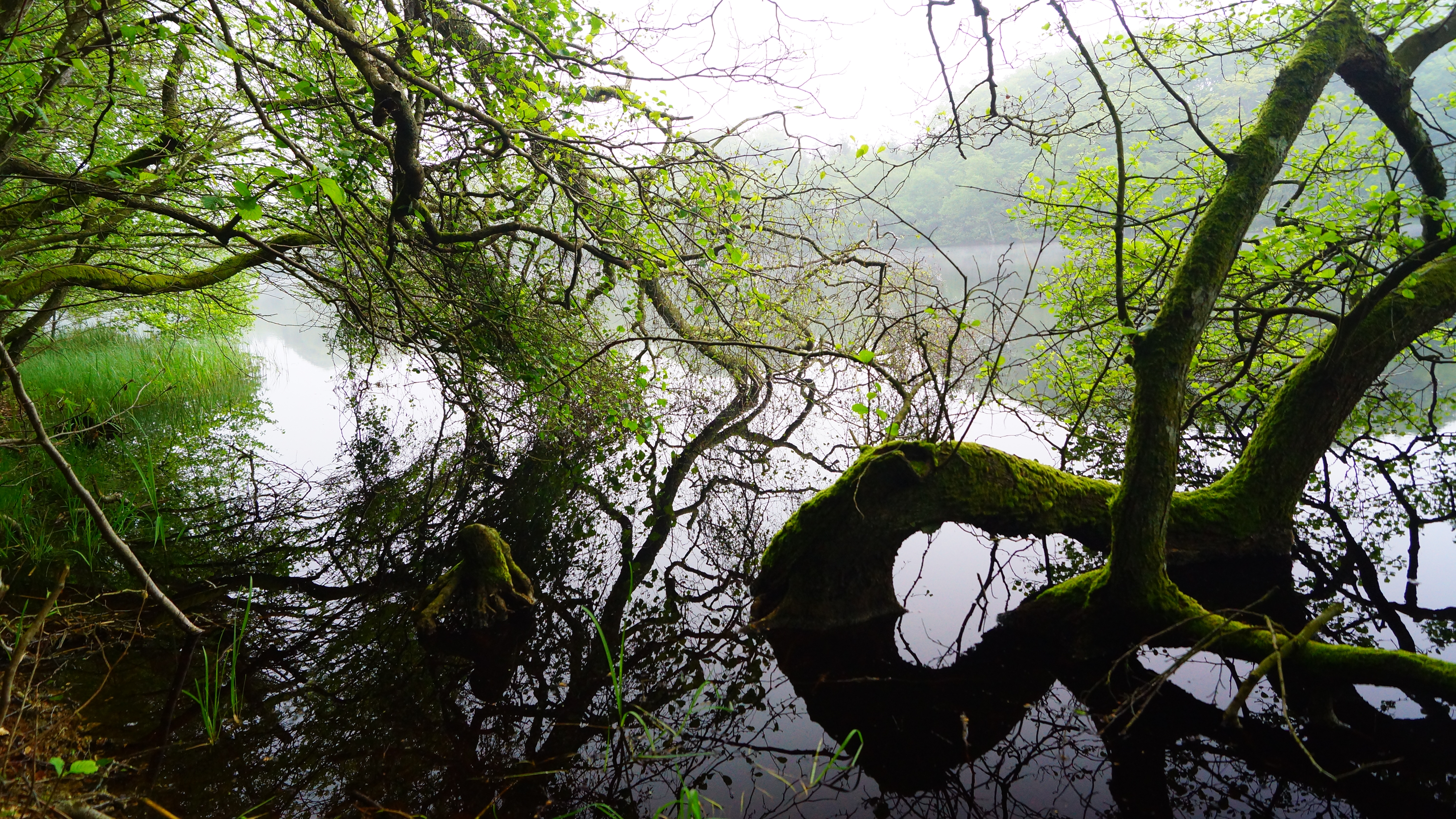 Løvenholm Skov, Langsø